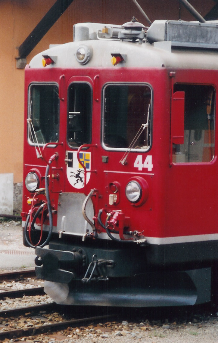 Foto is gemaakt van een rhb trein op het station van Tirano.